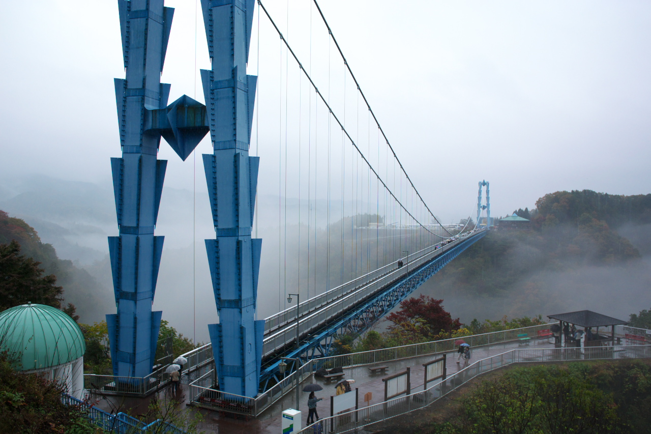 竜神大吊橋の全景。全長375m。2006年までは歩行者専用の吊り橋としては日本最長でした。今は本州最長となっています。